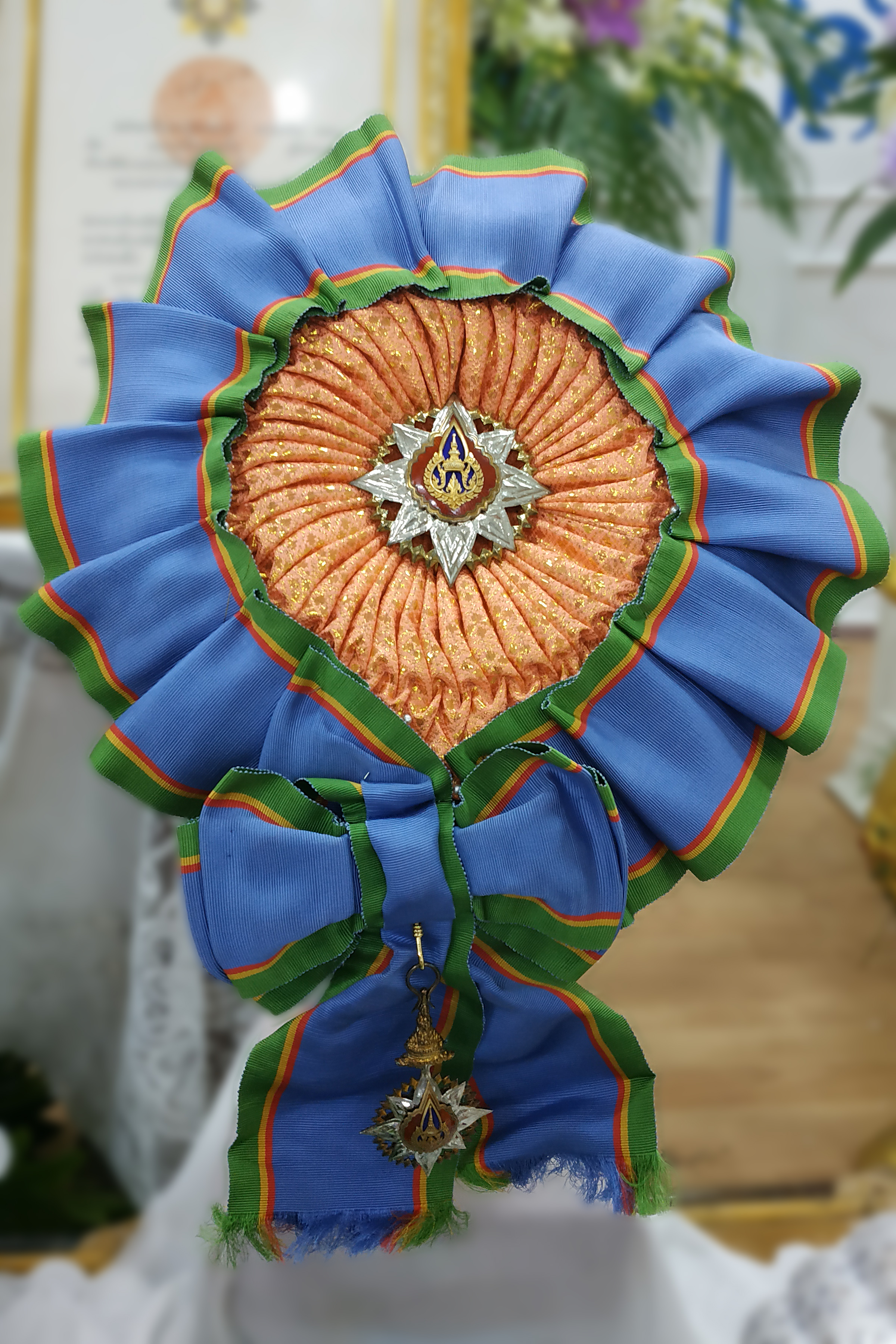 สายสะพาย ดวงตรา และดาราเครื่องราชอิสริยาภรณ์อันมีเกียรติยศยิ่งมงกุฎไทย ชั้นที่ 1 ประถมาภรณ์มงกุฎไทย